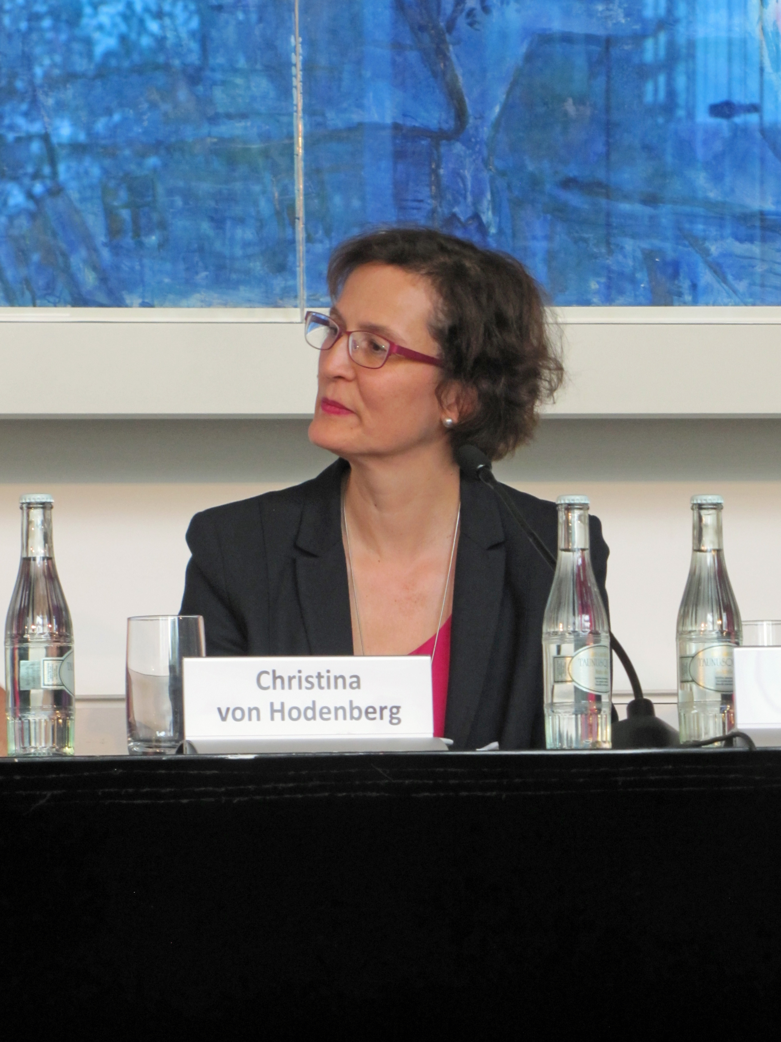 Christina von Hodenberg, bei den 46. Römerberggesprächen, Thema:1968-2018: What is left?' Errungenschaft und Bürde eines politischen Aufbruchs", im April 2018 im Chagall-Saal der Städtischen Bühnen in Frankfurt am Main.